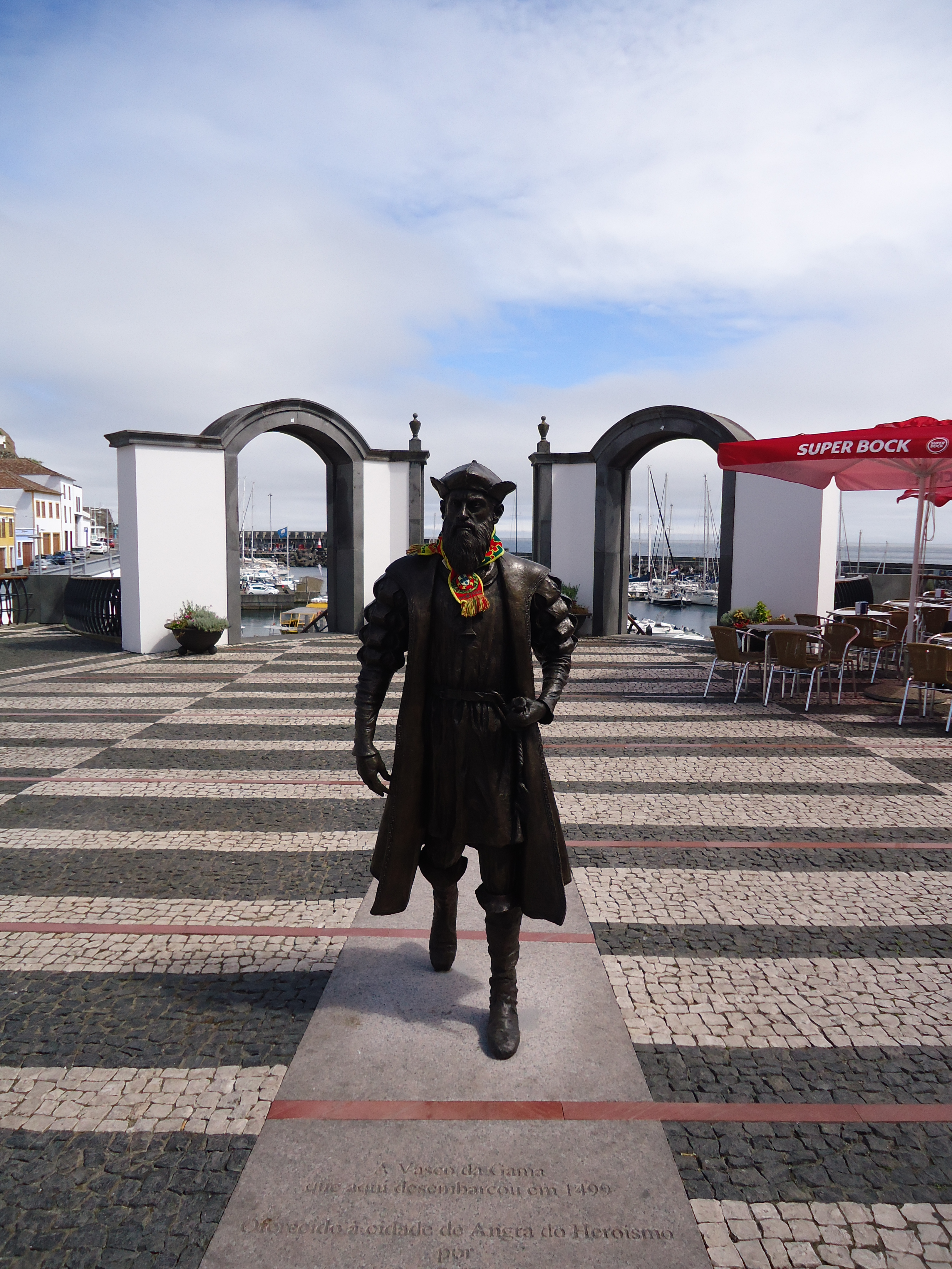 Homenagem a Vasco da Gama, Pátio da Alfândega, Angra do Heroísmo, ilha Terceira, Açores, Portugal. Bronze, tamanho natural, Duker Bower. A inscrição reza: "A Vasco da Gama / que aqui desembarcou em 1499" / Oferecido à cidade de Angra do Heroísmo / por / Victor S. Baptista / Adroaldo S. Baptista / Obra de Duker Bower / inaugurada a 10 de junho de 2016"